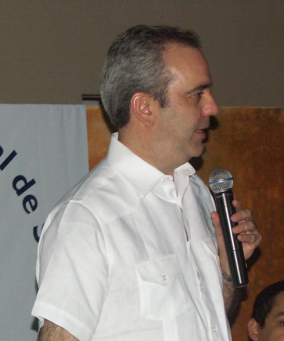 Luis Abinader en un mitín político en 2011